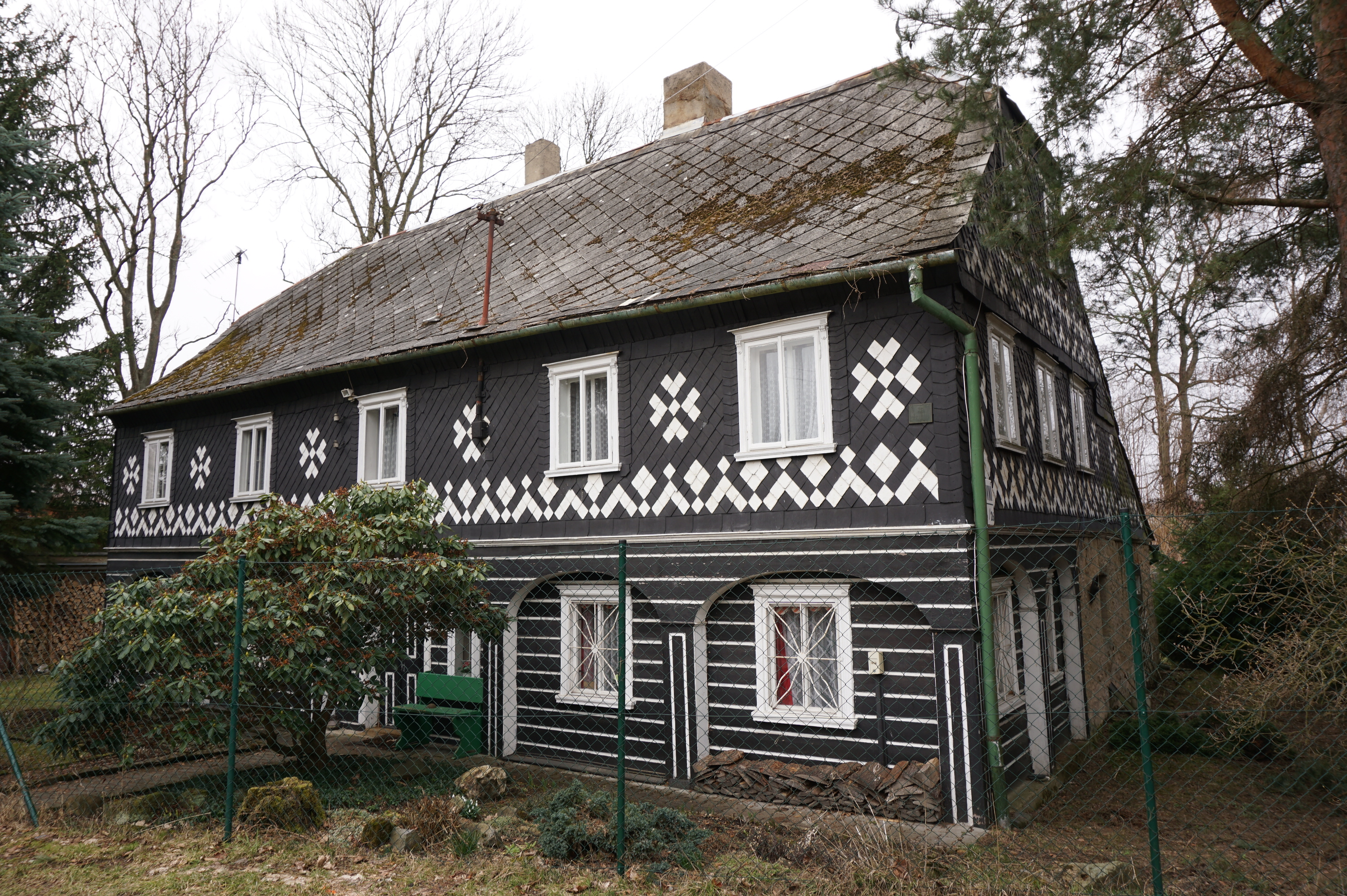 Usedlost čp. 154, Sportovní 154, Horní Jindřichov.